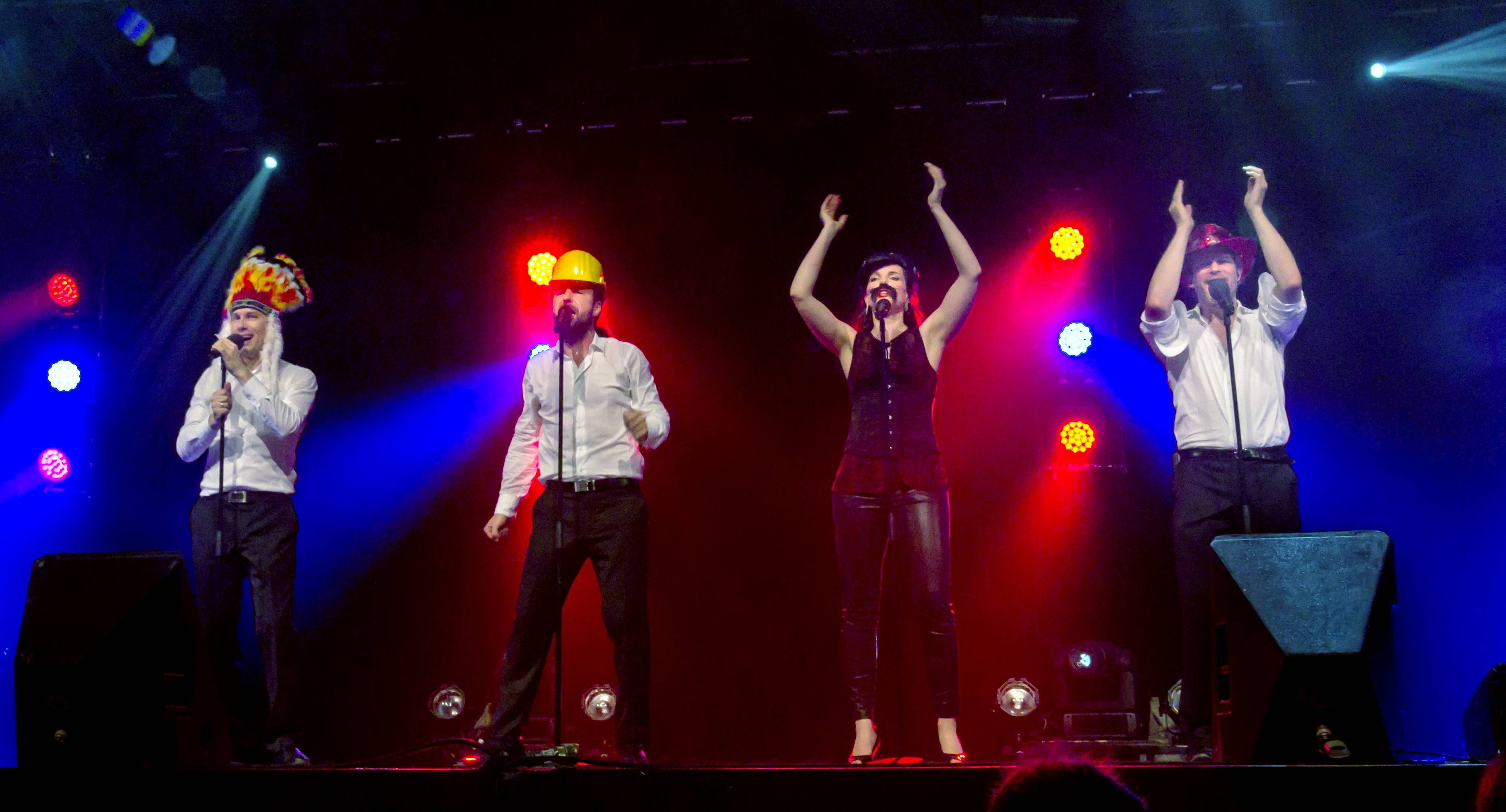 Bilder vom ZMF 2015, die Gala Lalelu am 15. Juli 2015